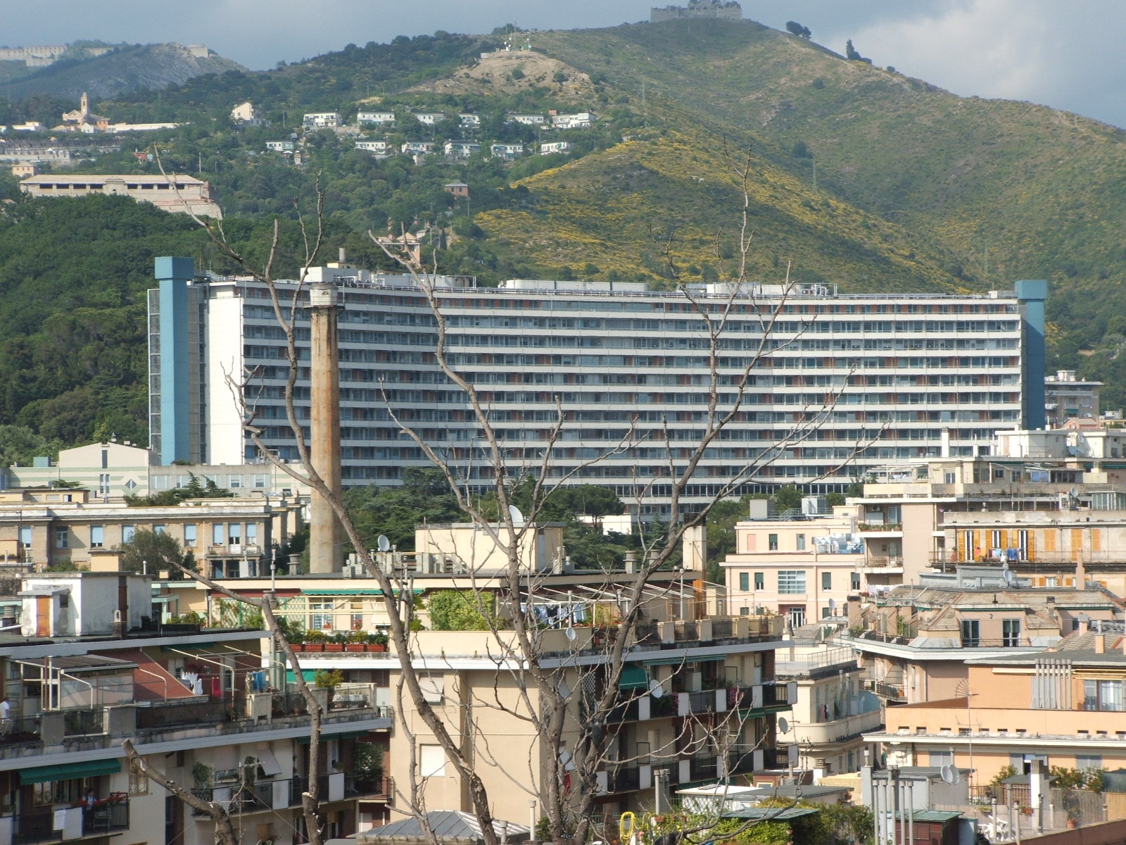 Genova, quartiere di San Martino, il "Monoblocco", che fa parte dell'ospedale San Martino. Sullo sfondo il forte di Santa Tecla e il quartiere collinare dei Camaldoli